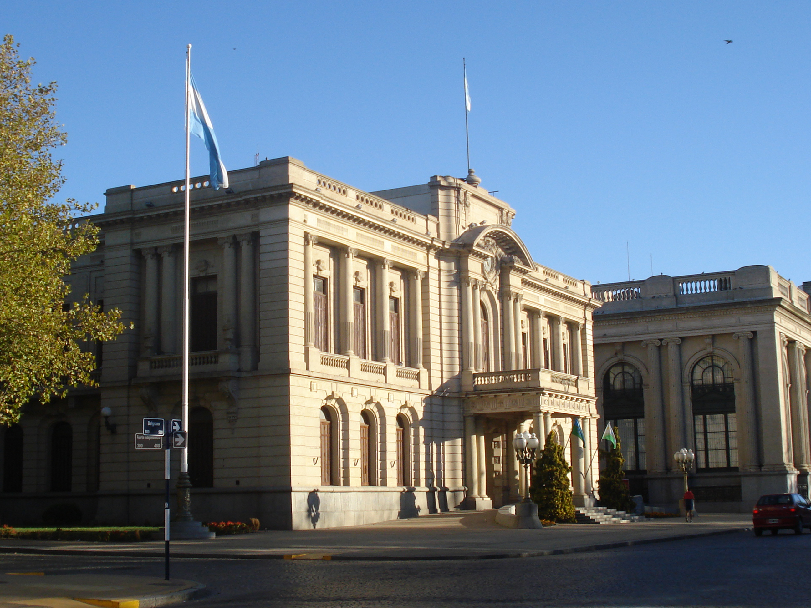 Municipalidad de Tandil, Buenos Aires, Argentina.